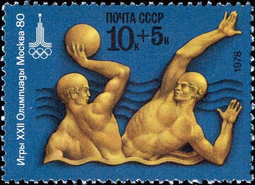 Почтовая марка СССР из серии «XXII летние Олимпийские игры 1980 года в Москве. Виды водного спорта», выпущенная 24 марта 1978 года. Марка посвящена водному поло, на ней изображены два спортсмена, эмблема олимпиады. Художник — Н. Литвинов. Номер — 4813 (ЦФА). Тираж — 5 млн экз.